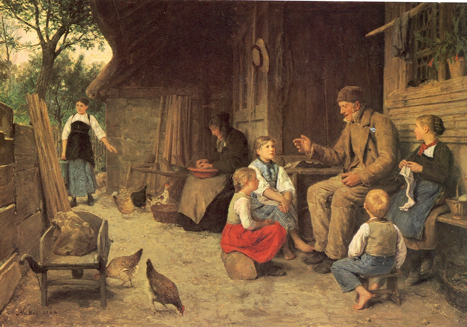 Der Grossvater erzählt eine GeschichteGrandfather Telling a Storytitle QS:P1476,de:"Der Grossvater erzählt eine Geschichte" label QS:Lde,"Der Grossvater erzählt eine Geschichte" label QS:Len,"Grandfather Telling a Story"